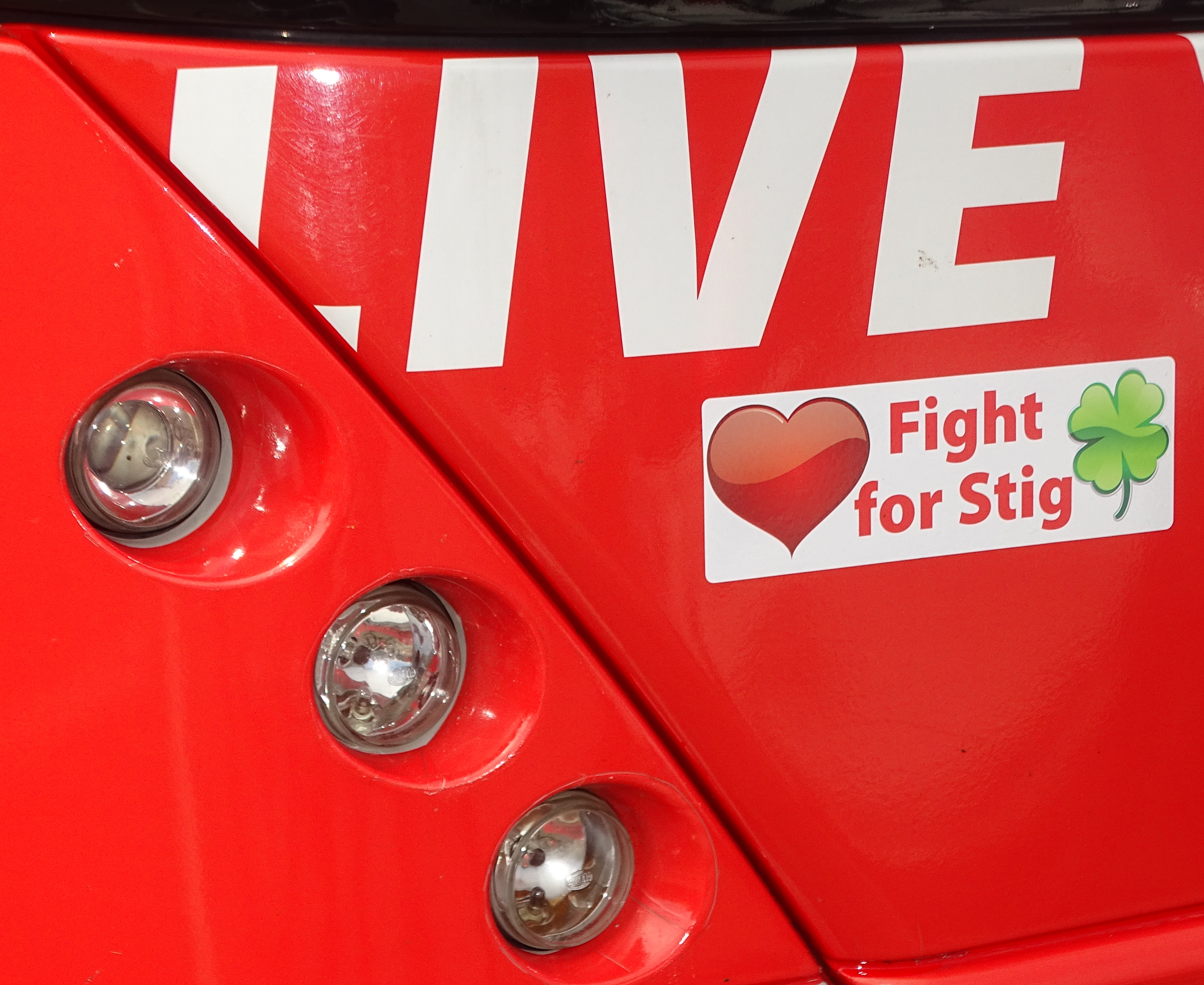 Reportage réalisé le mercredi 22 juin à l'occasion du départ de Halle-Ingooigem 2016 à Hal, Belgique.